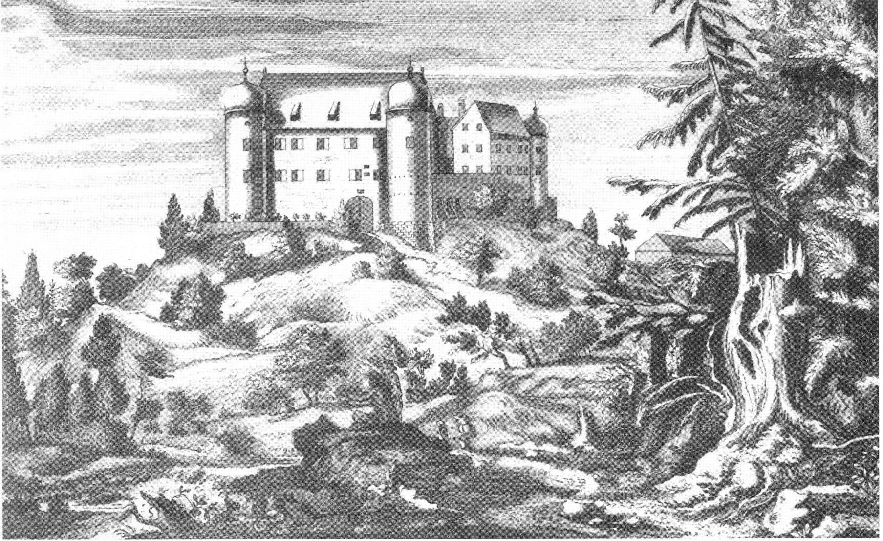 Schloss Kronburg Kupferstich